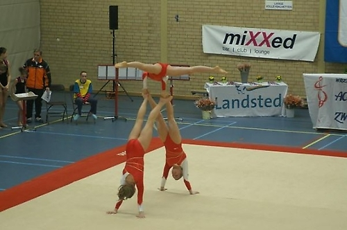 Een wedstrijdoefening van acrogym.